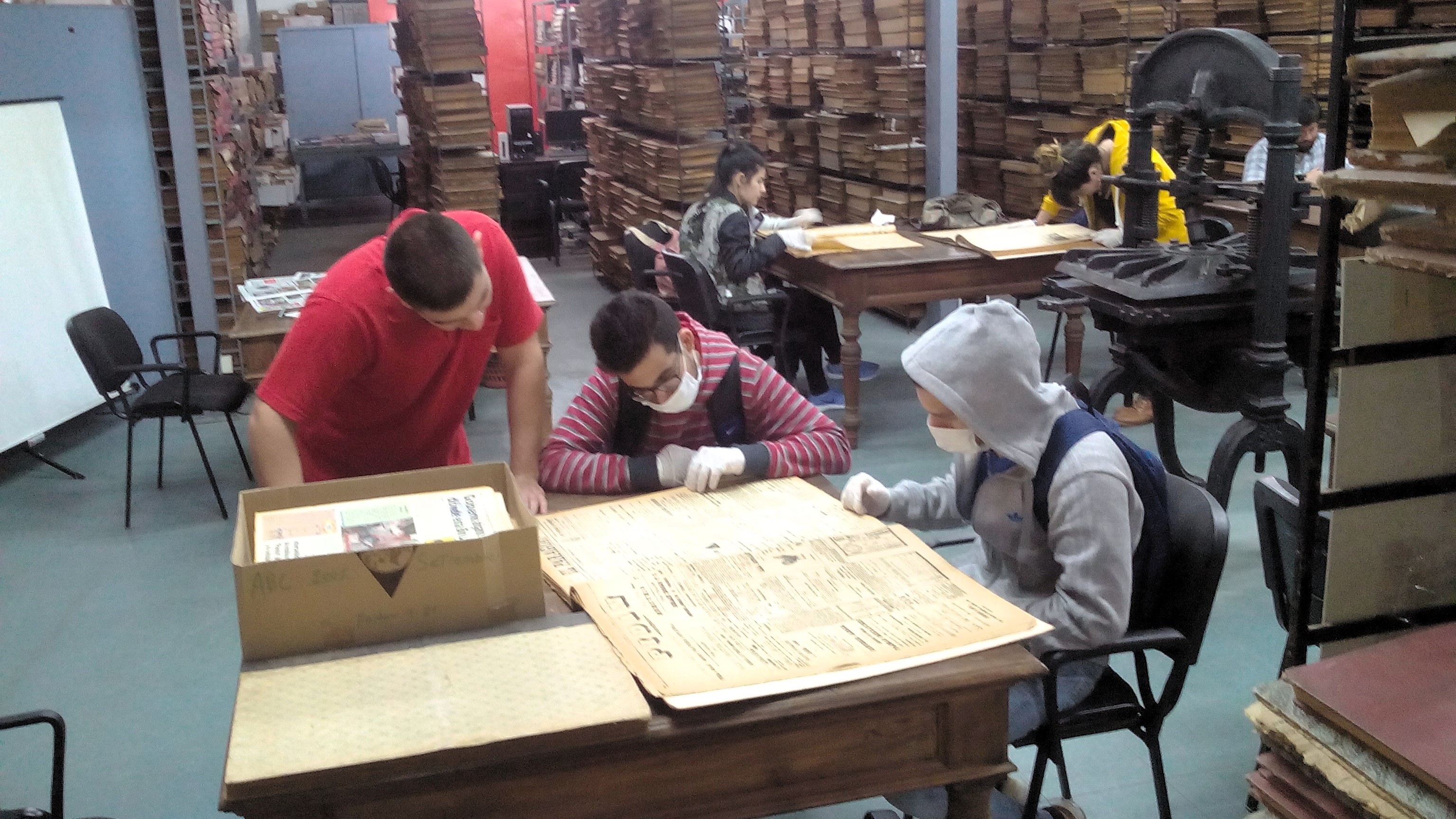 Hemeroteca Nacional del Paraguay parte de la Biblioteca Nacional